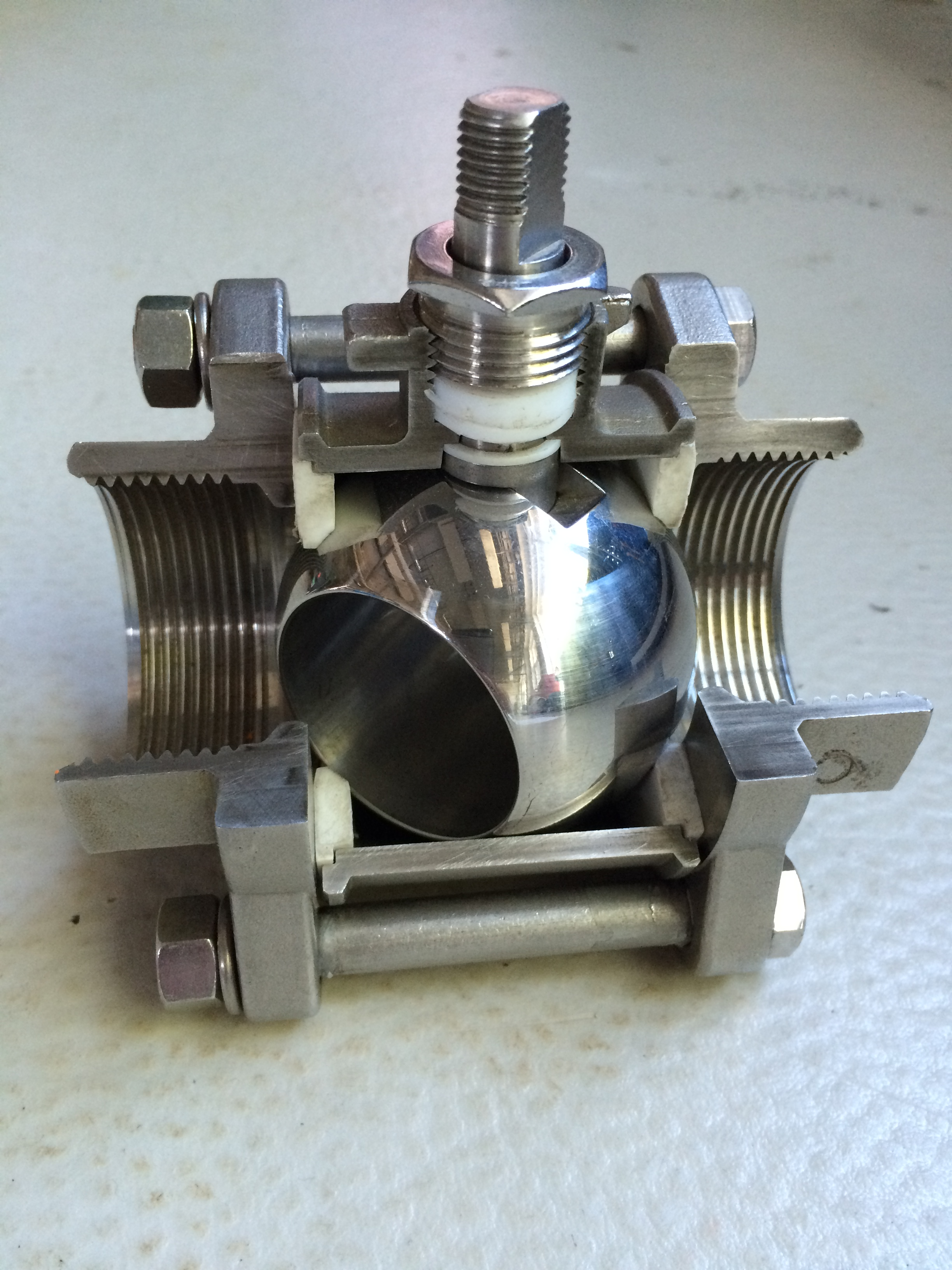 A ball valve, cut open.